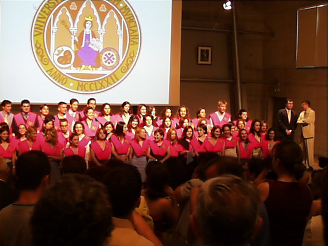 Acto de graduación de estudiantes de Diplomado en Biblioteconomía y Documentación